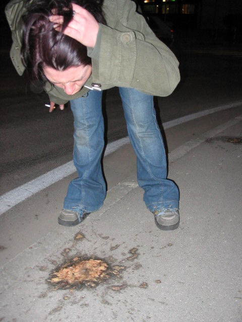 Lejos del civo